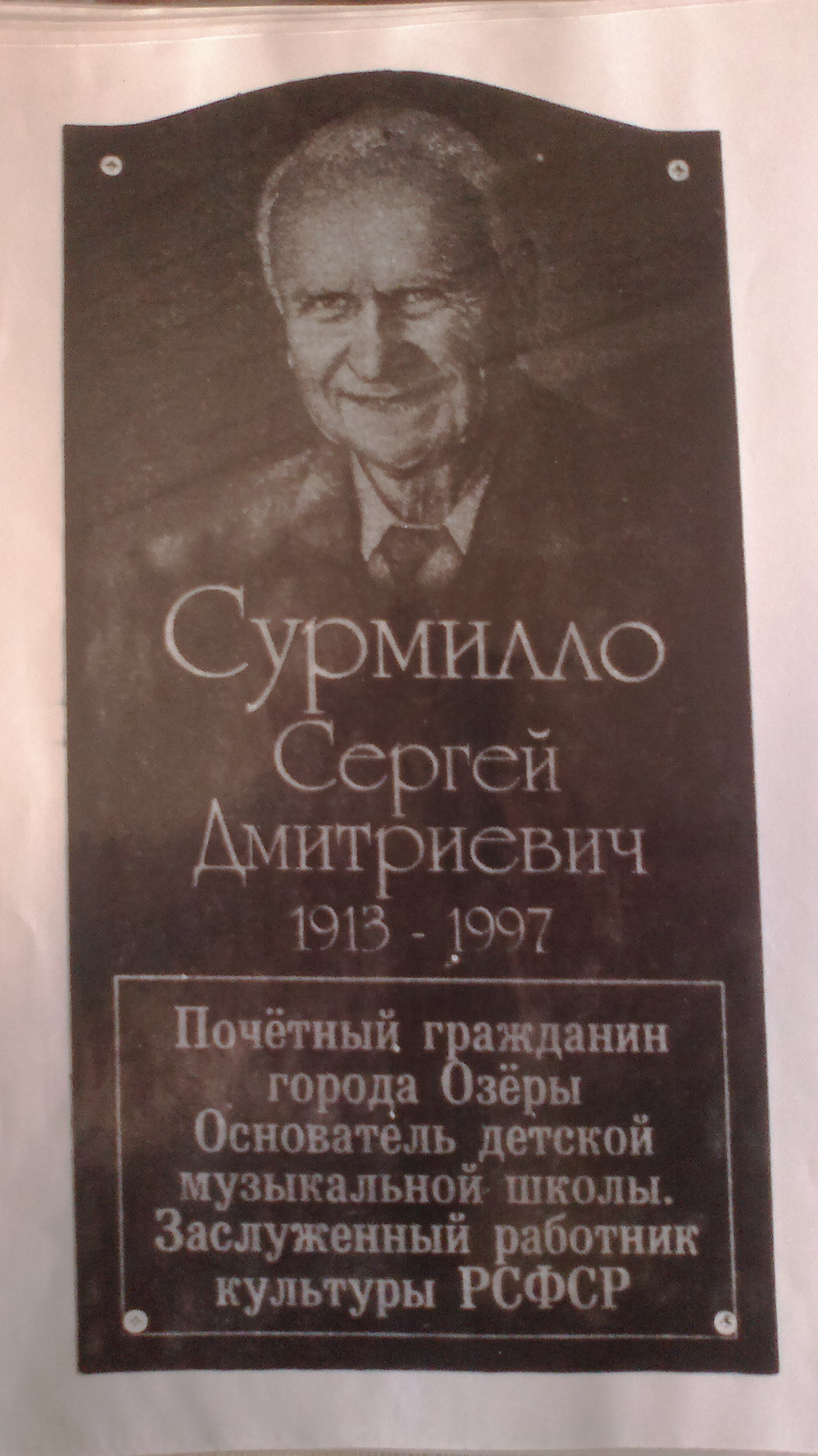 Мемориальная доска Сурмилло Сергея Дмитриевича, размещённая на фасаде здания Дворца культуры в г.о.Озёры